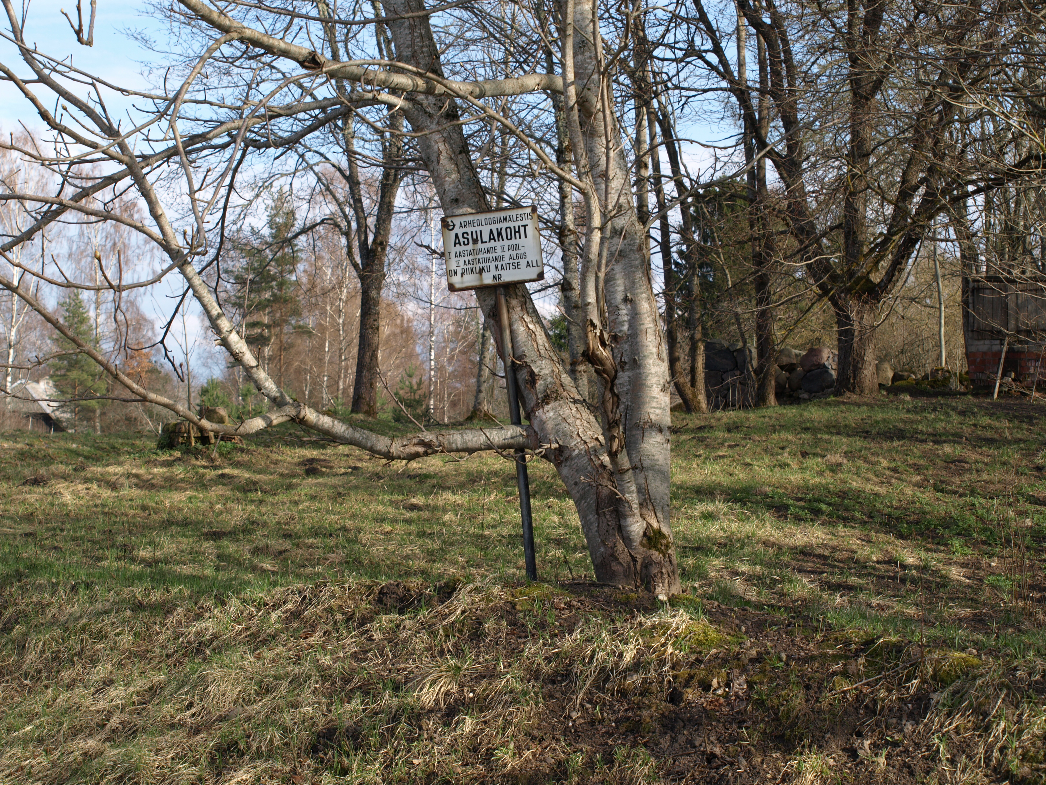 Kärevere asulakoht Suure-Jaani vald Viljandi maakond